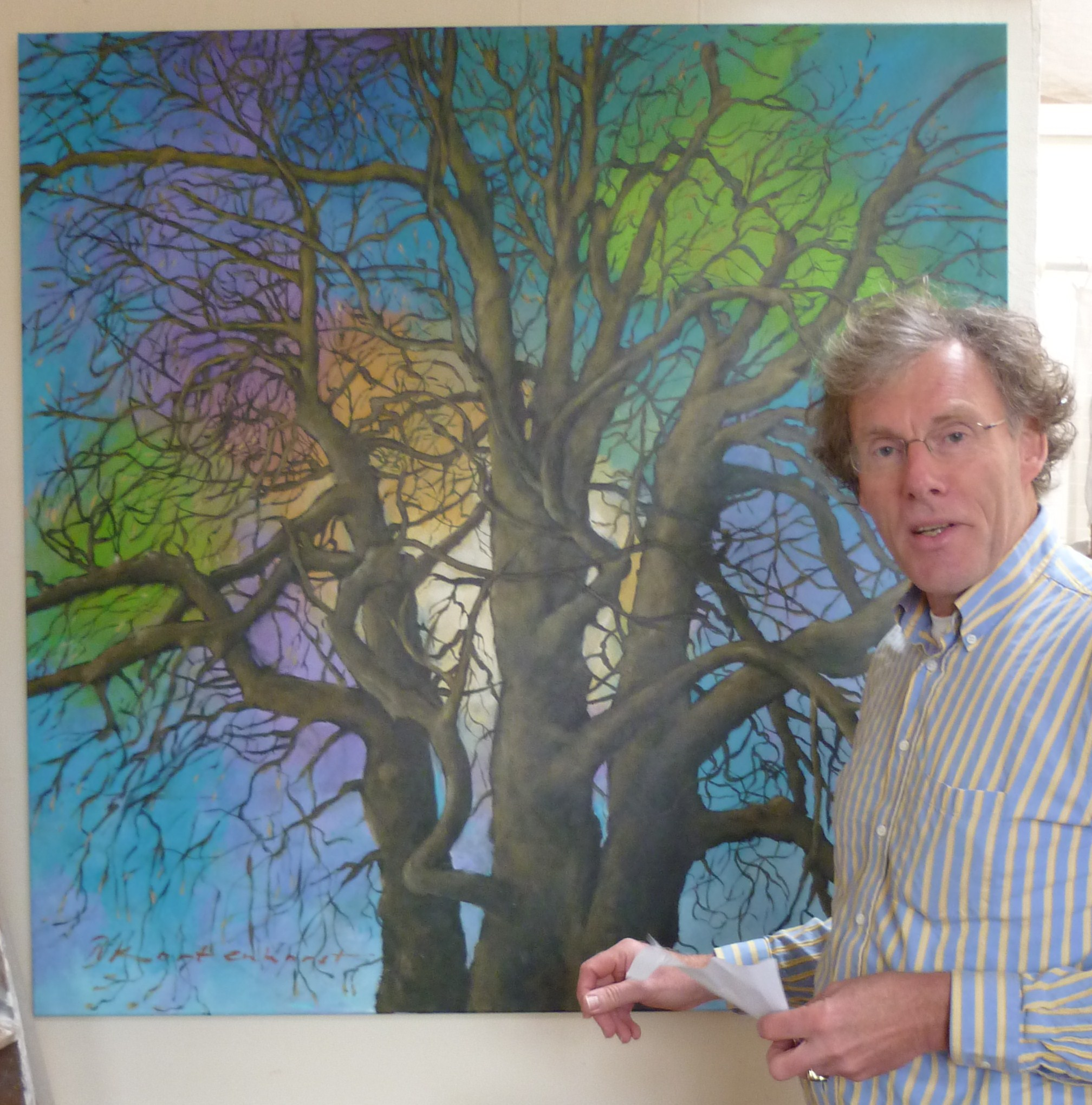 Schilderij_van_de_boom_van_Anne_Frank door Rudolf Kortenhorst